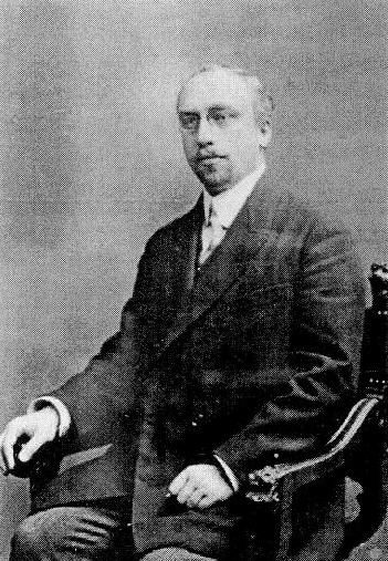 Josef Podpěra (1878 - 1954), Český a československý botanik.